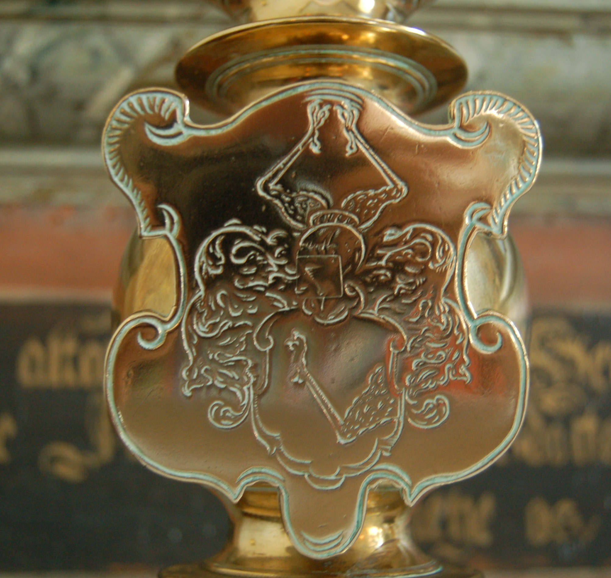 Dorte Knudsdatter Urne sitt våpen - lysestake i Tjølling kirke